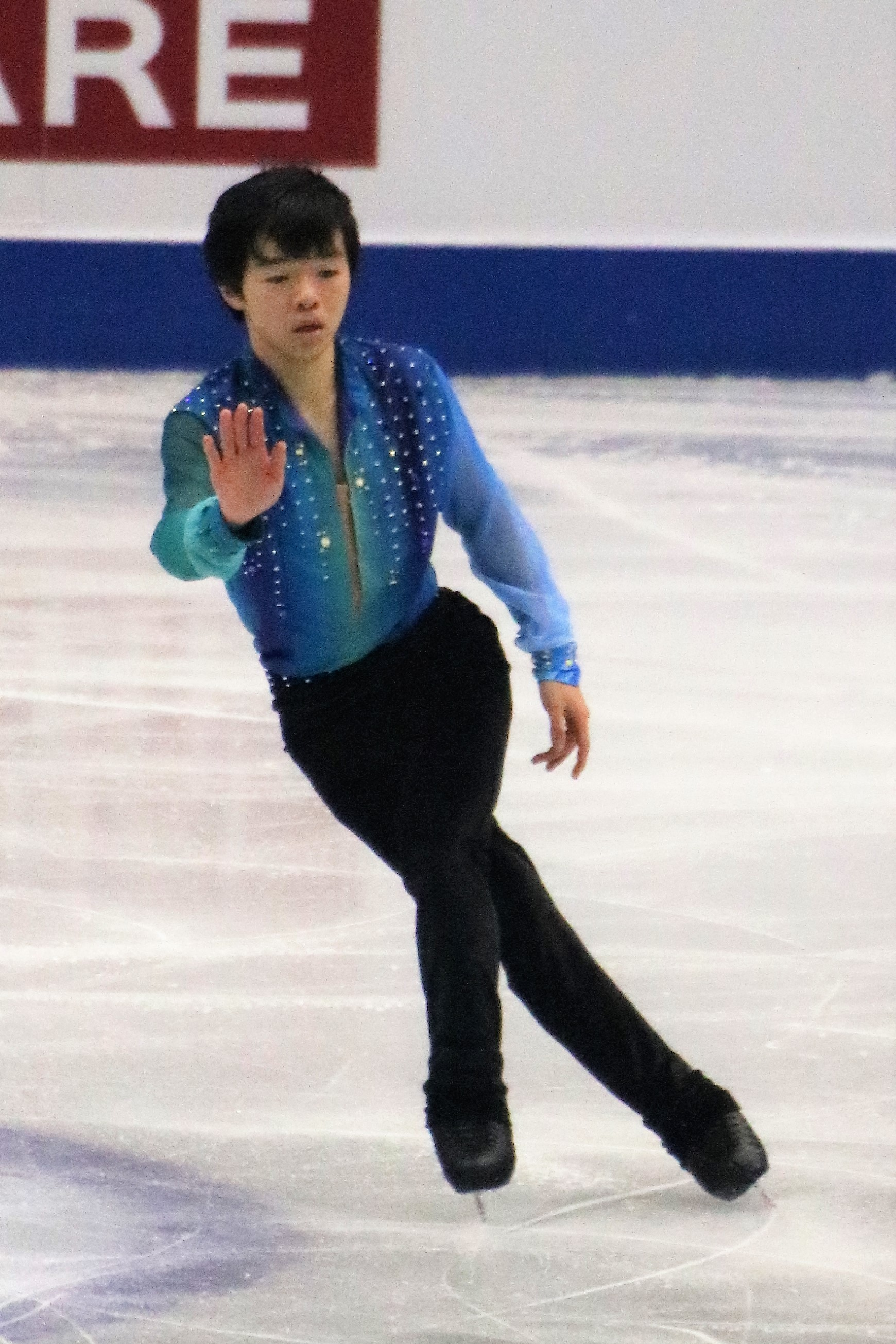 Юма Кагияма (Япония) на финале юниорского Гран-при 2019-2020